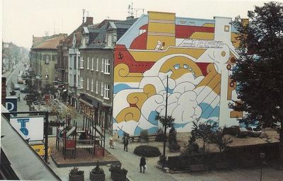 Trelleborg mural